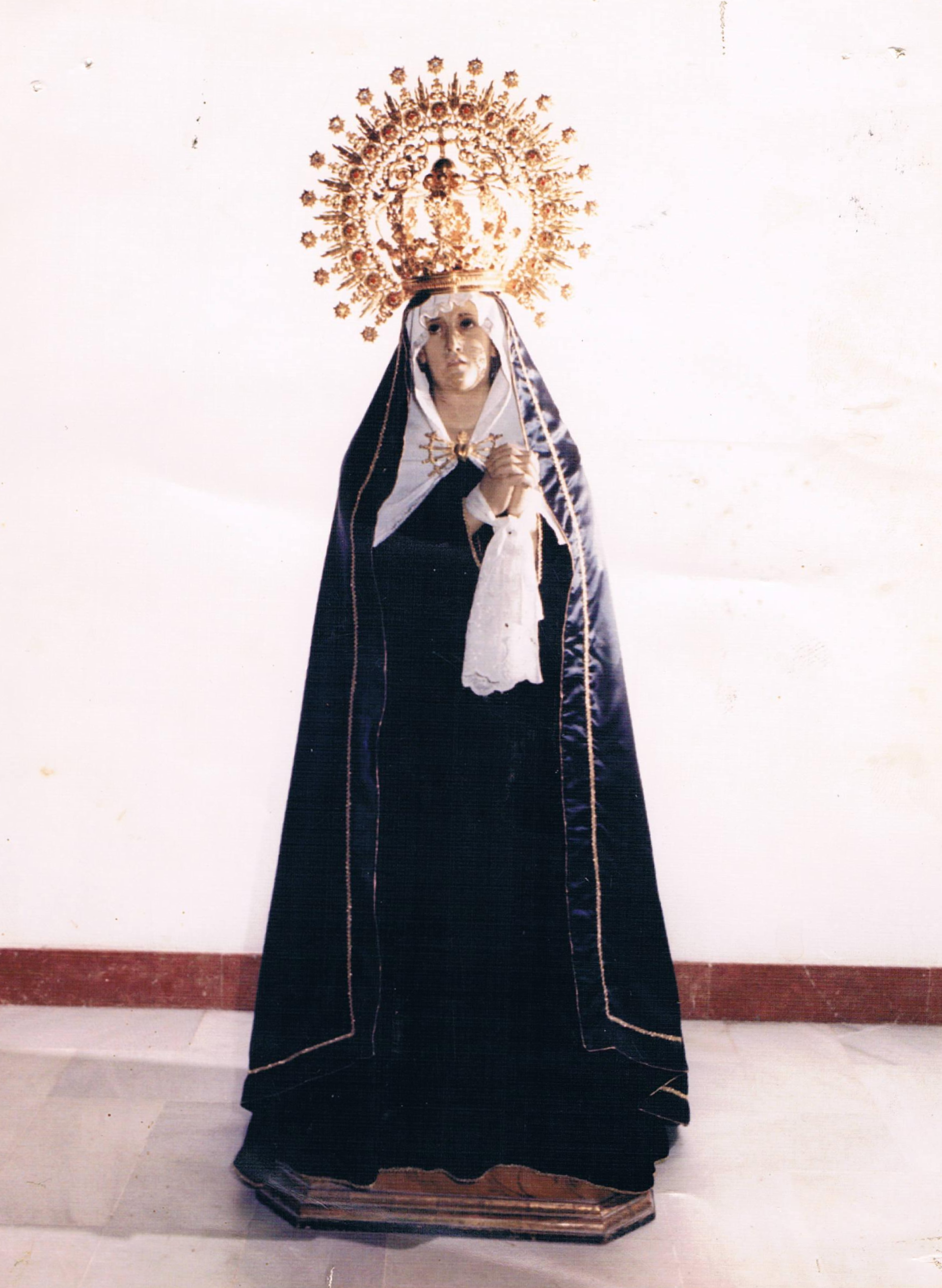 Fotografía de la Virgen de los Dolores de Roquetas de Mar en 1991